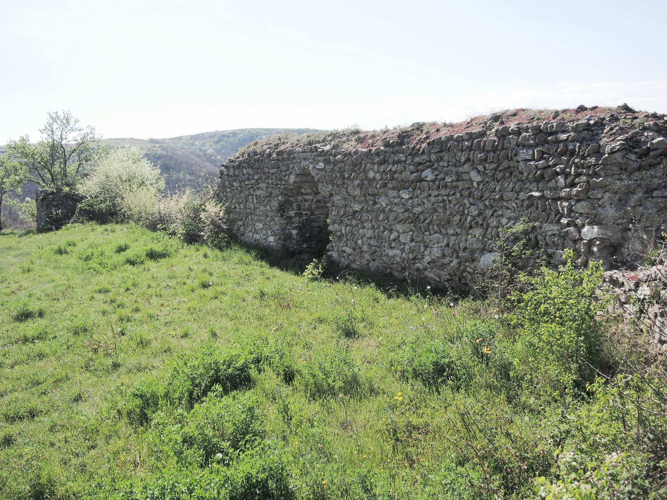 Sarras vue partielle